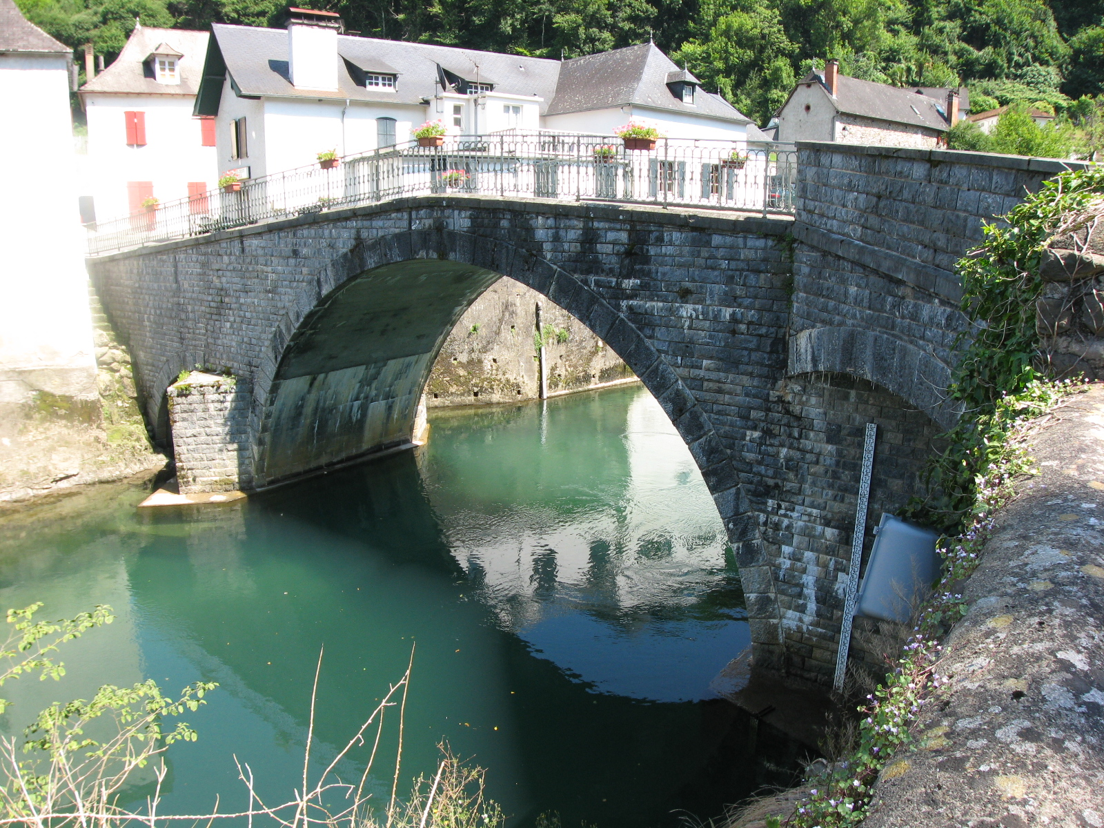 Pont des lamiñak à Licq-Atherey en Soule (Pyrénées-Atlantiques) (Pyrénées).